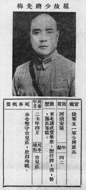 中文（台灣）: 抗戰軍人忠烈錄第一輯中的烈士遺像